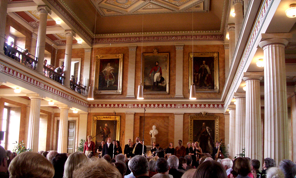 Göttingen, Germany: Konzert der Händelfestspiele 2005 in der Aula der Universität Göttingen am Wilhelmsplatz